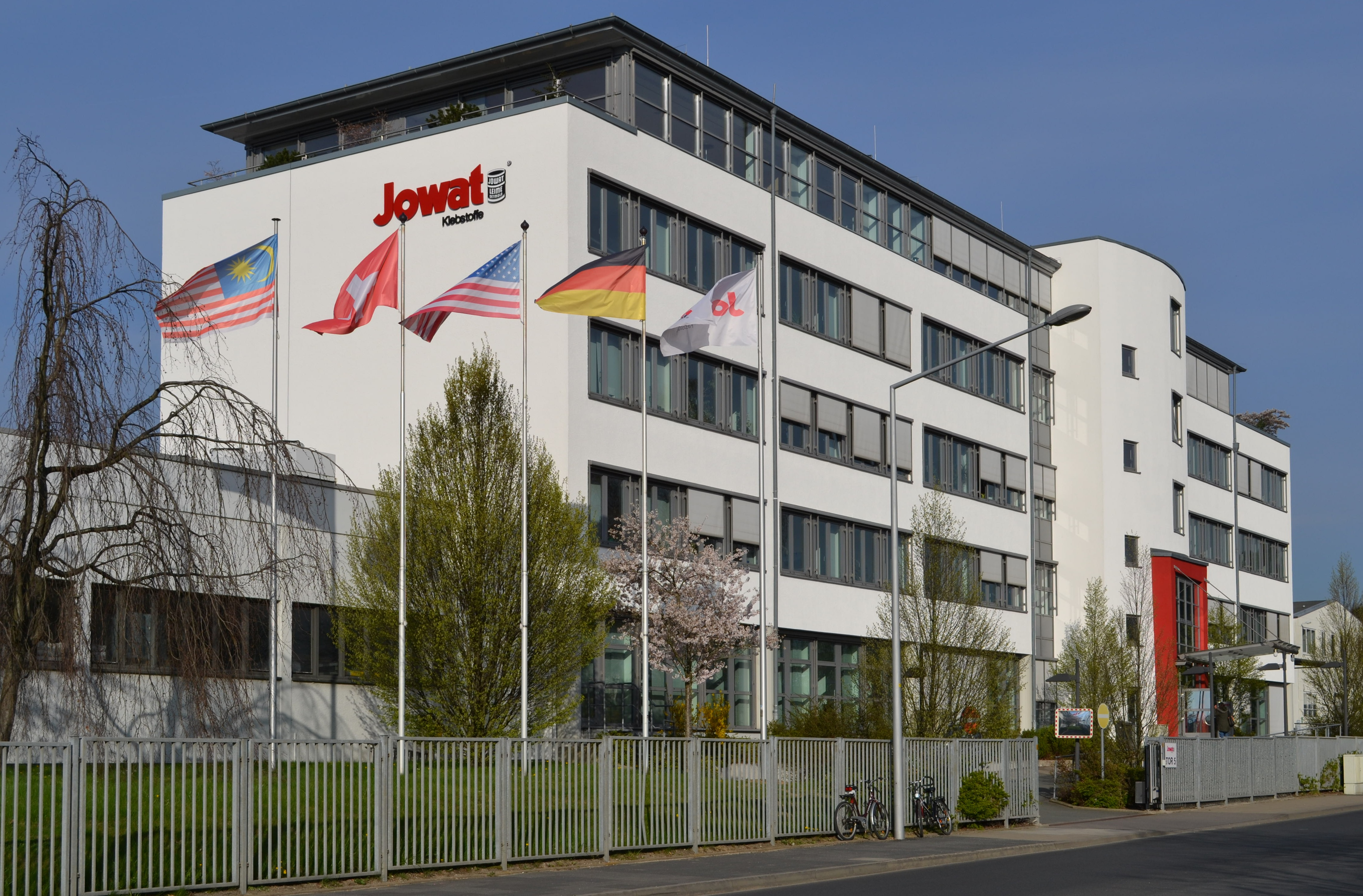 Jowat in Detmold, Ernst-Hilker-Straße 10-14